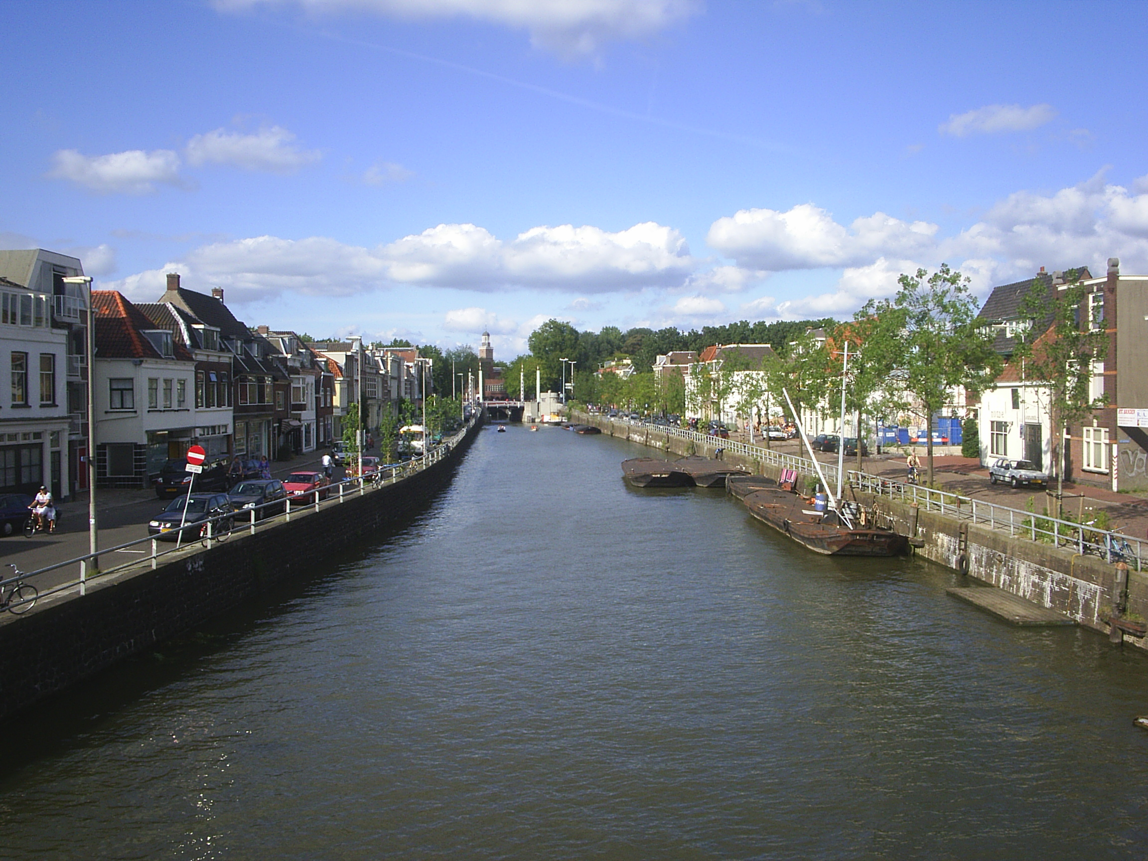 Vaartse Rijn, Utrecht, The Netherlands